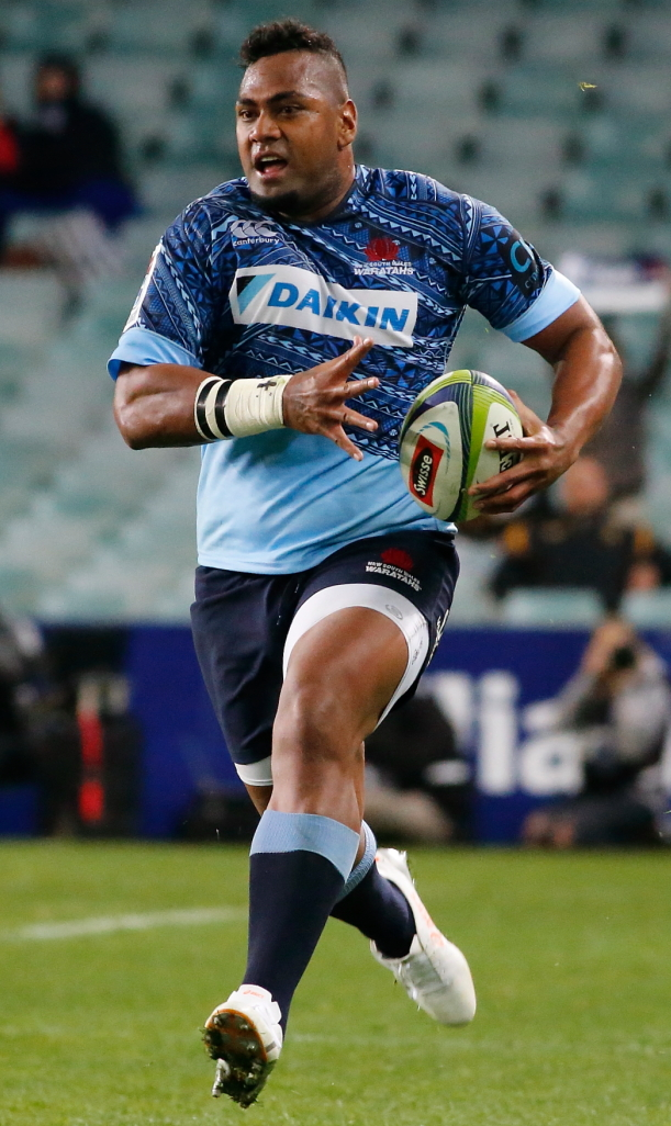 2017.07.08.21.28.31-WARvJAG-0004